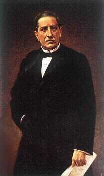 207x350 Estanislao Figueras y Moragas (* 13. November 1819 in Barcelona, † 11. November 1882 in Madrid) war ein spanischer Rechtsanwalt und Politiker. Er war vom 12. Februar bis zum 11. Juni 1873 Präsident der Exekutivgewalt der Ersten Republik in Spanien.